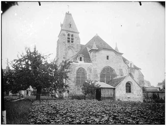 Chevet et clocher de l'église Notre-Dame-de-l'Assomption-de-la-Très-Sainte-Vierge de Saulx-les-Chartreux (91)